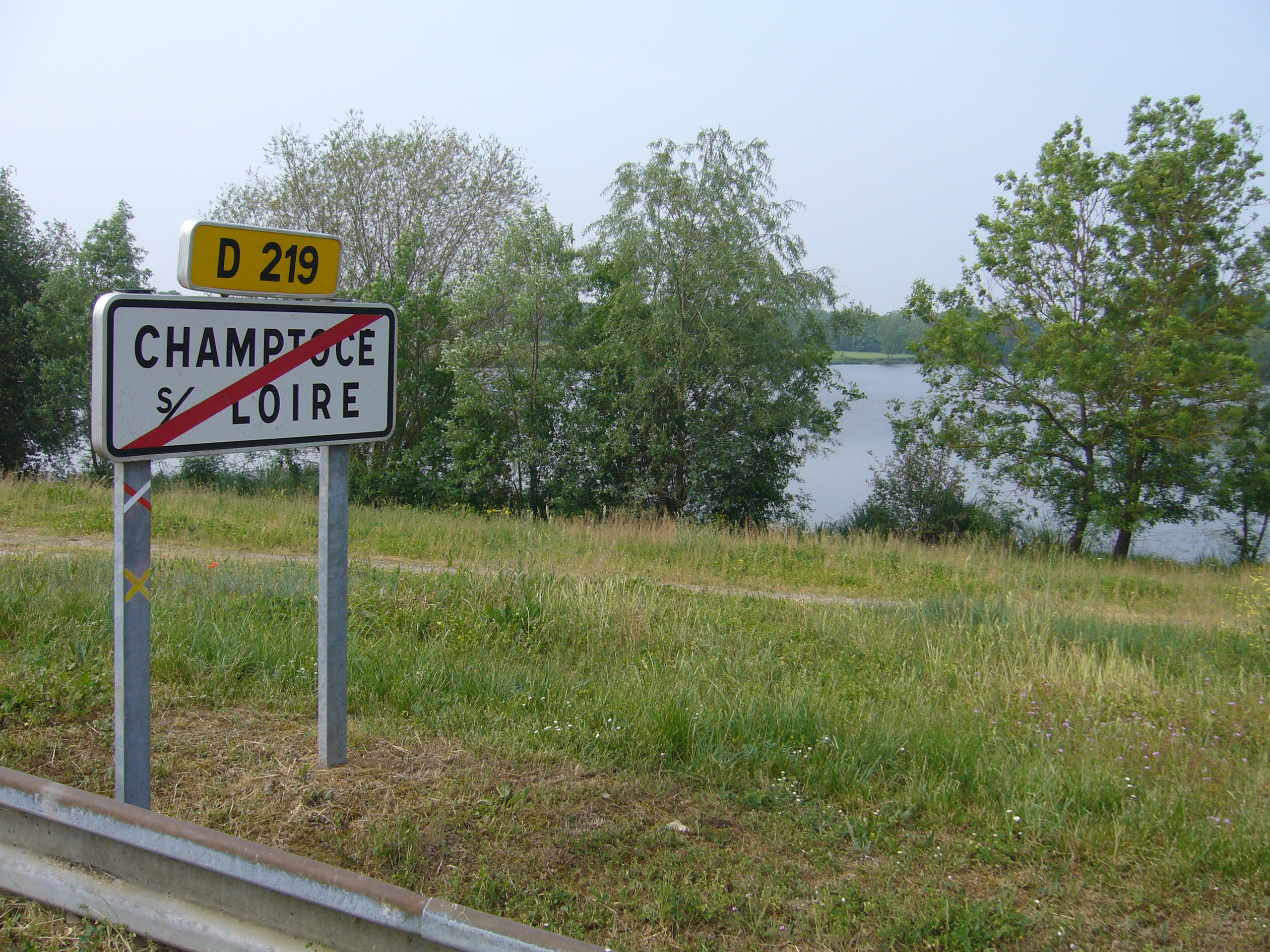 La boire de Champtocé à l'arrière du panneau routier.